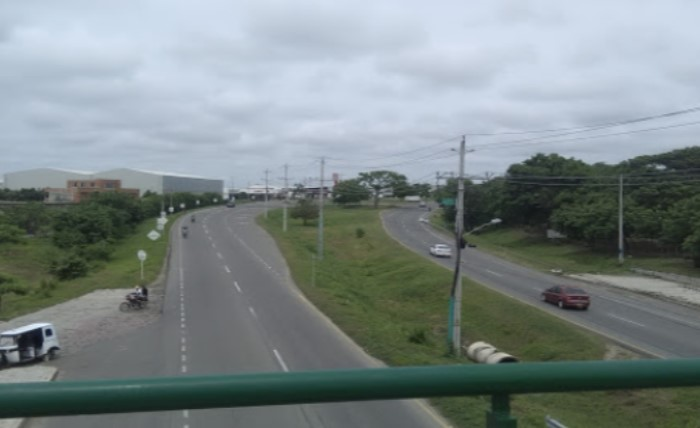 Galapa